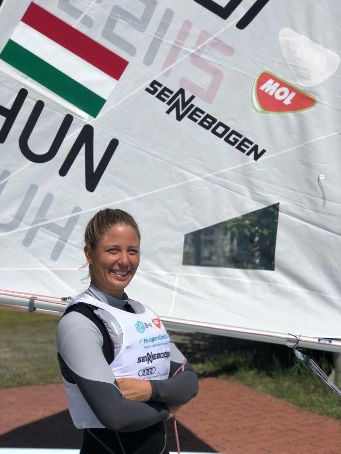 Érdi Mária vitorlázó